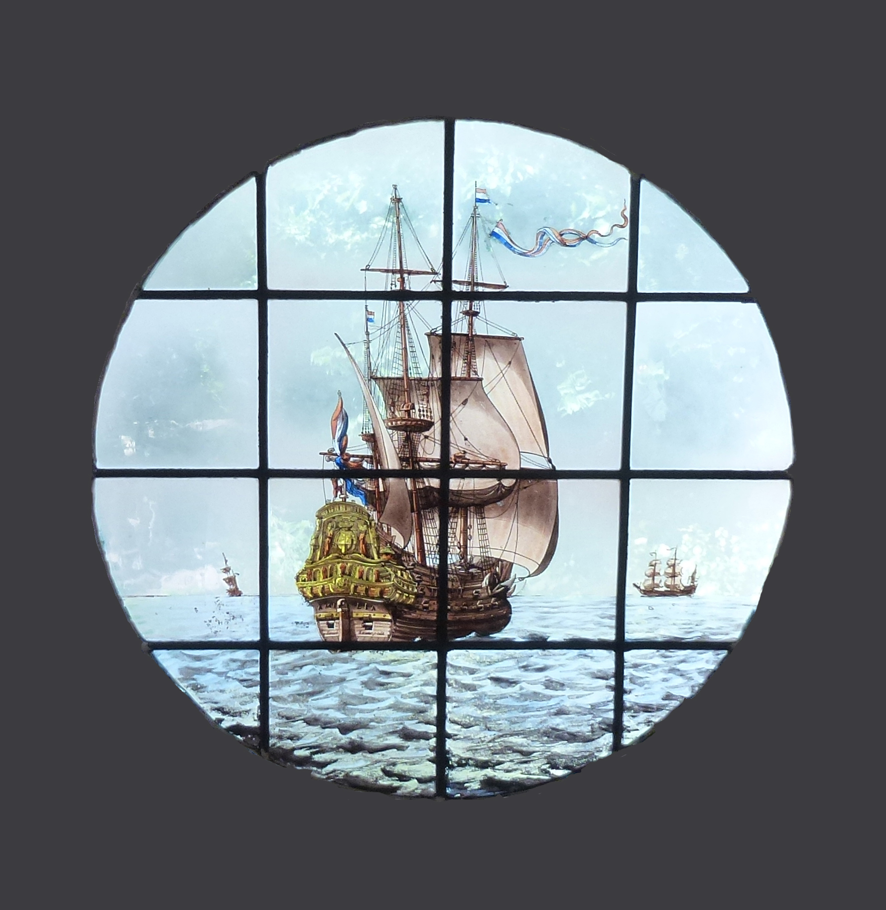 Glas-in-lood raam met de afbeelding van het Galjoen Amilia of Aemilia, vlaggenschip van Maarten Tromp tijdens de Zeeslag bij Duins ook wel de Slag bij de Hoofden genoemd.